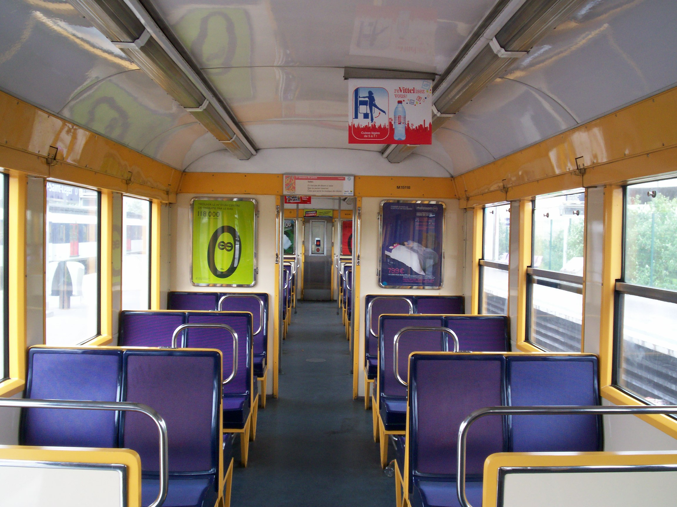 Intérieur d'un MS 61